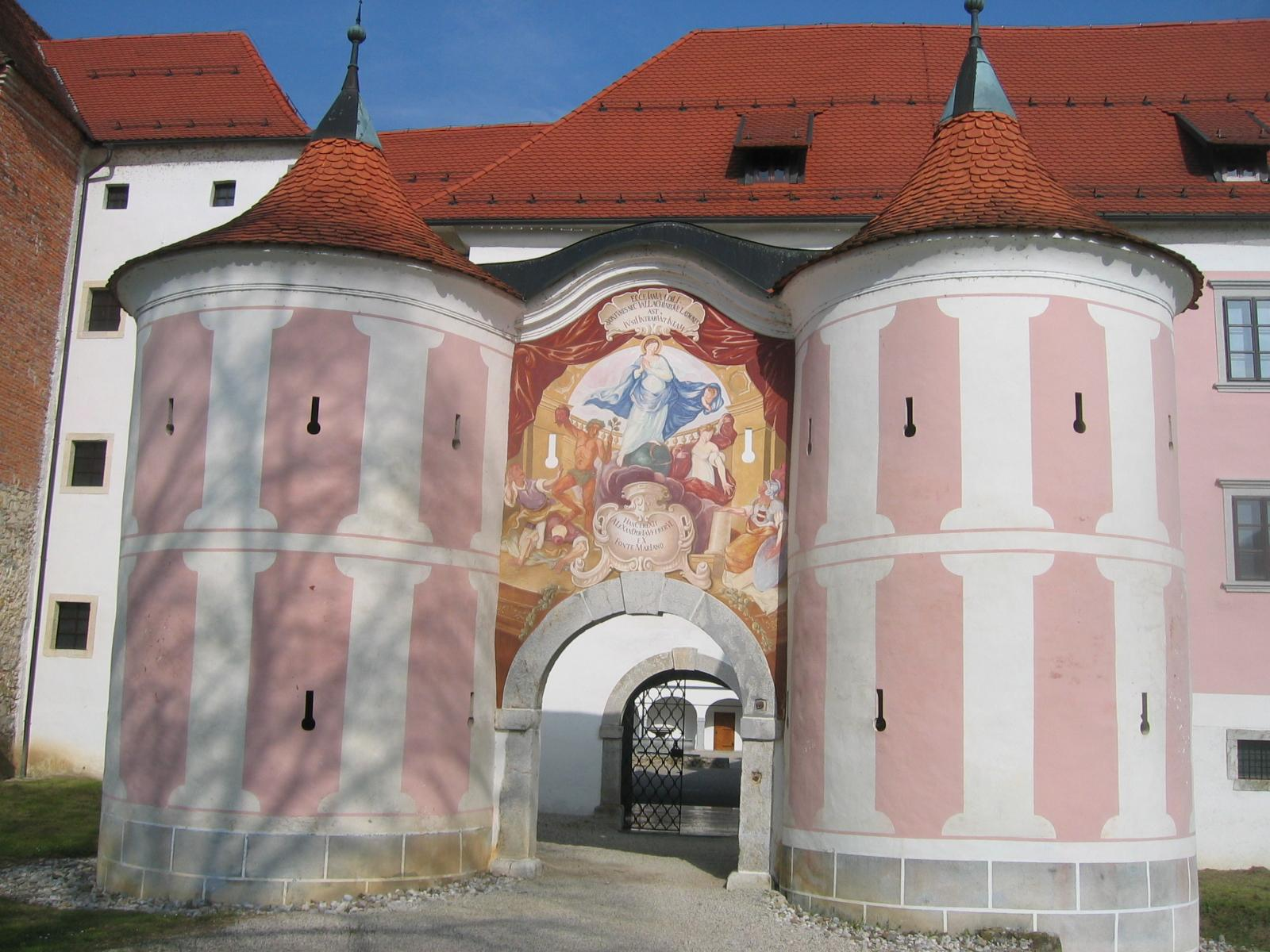 Castle (monastery) Kostanjevica na Krki, Slovenia photo:Ziga 07:45, 2 April 2007 (UTC)